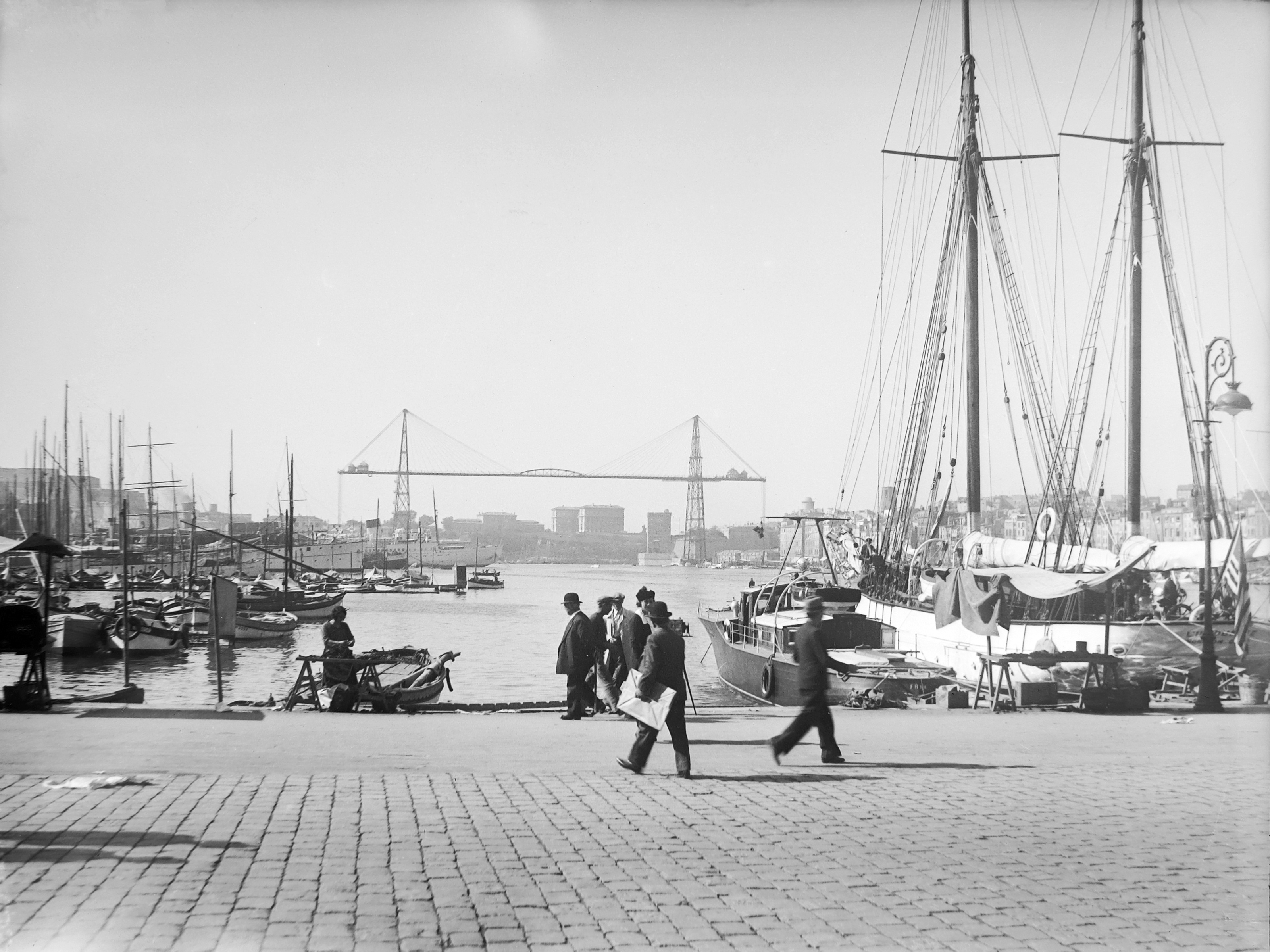 Le vieux port de Marseille et le pont transbordeur